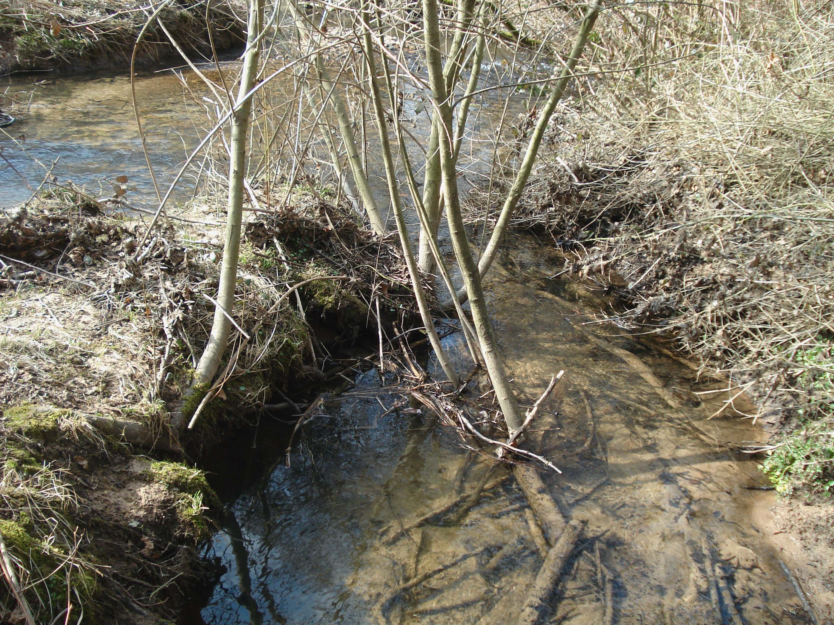 Die Mündung des Habersbaches (rechts) in die Kahl